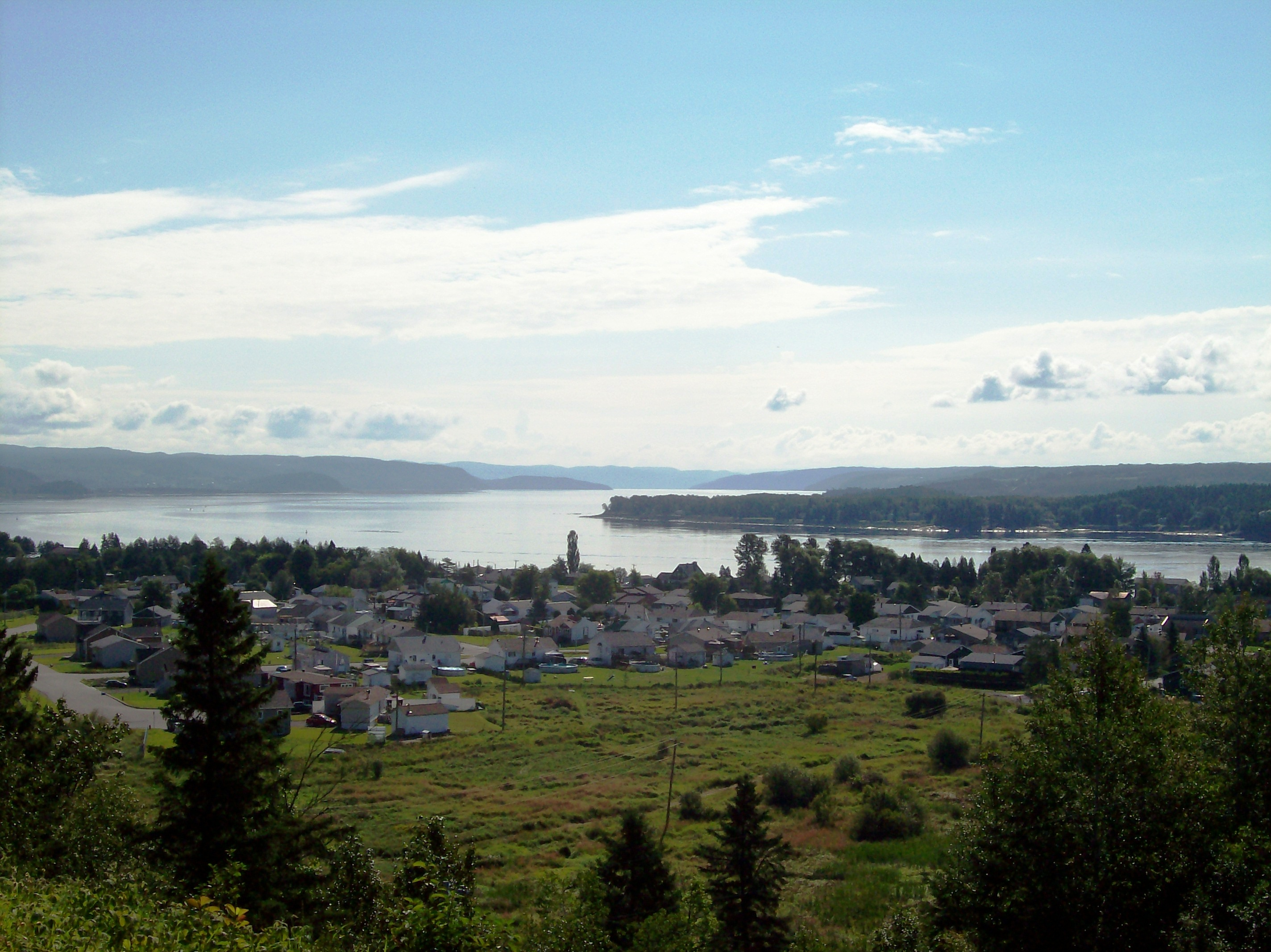 Vue de la partie de Canton Tremblay longeant le Saguenay (Québec, Canada) à partir des montagnes alentours.